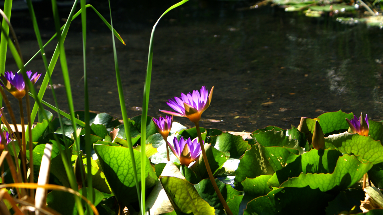 Hévíz tavirózsa